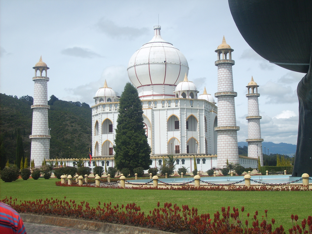 Taj Mahal, Parque Jaime Duque